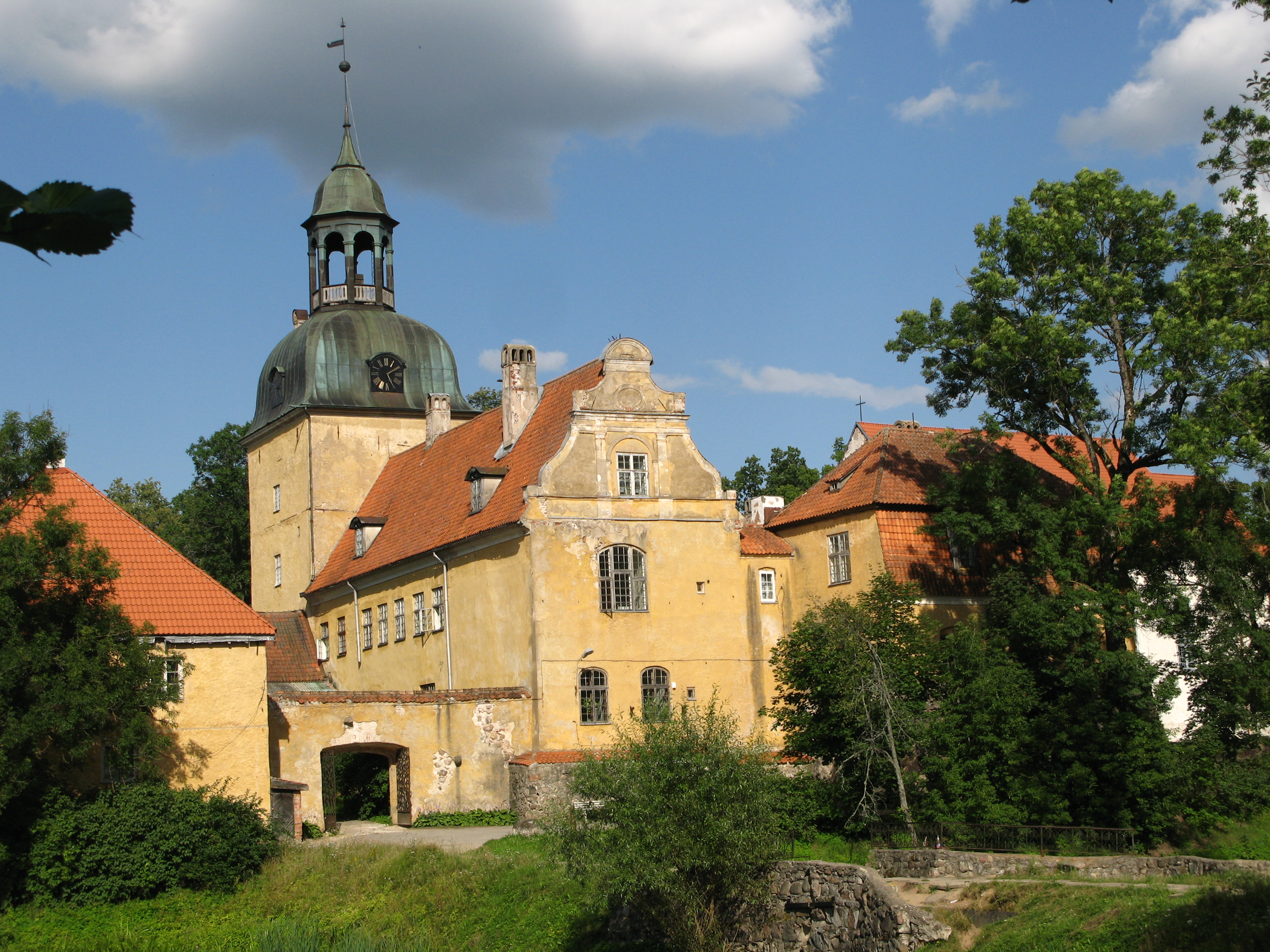 Straupe